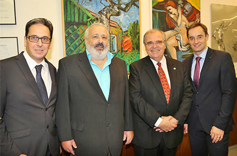 Vernissage „L‘ OEuvre – Études“ in der Sparkasse AG, Horn, Niederöstereich. Personen von links: Bankdirektor Dir. Helmuth Scheidl, Akademischer Künstler Helmuth Gräff, Justizminister Wolfgang Brandstetter und Bankdirektor Dir. Franz Kurzreiter